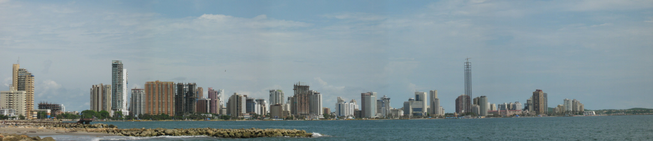 Bocagrande